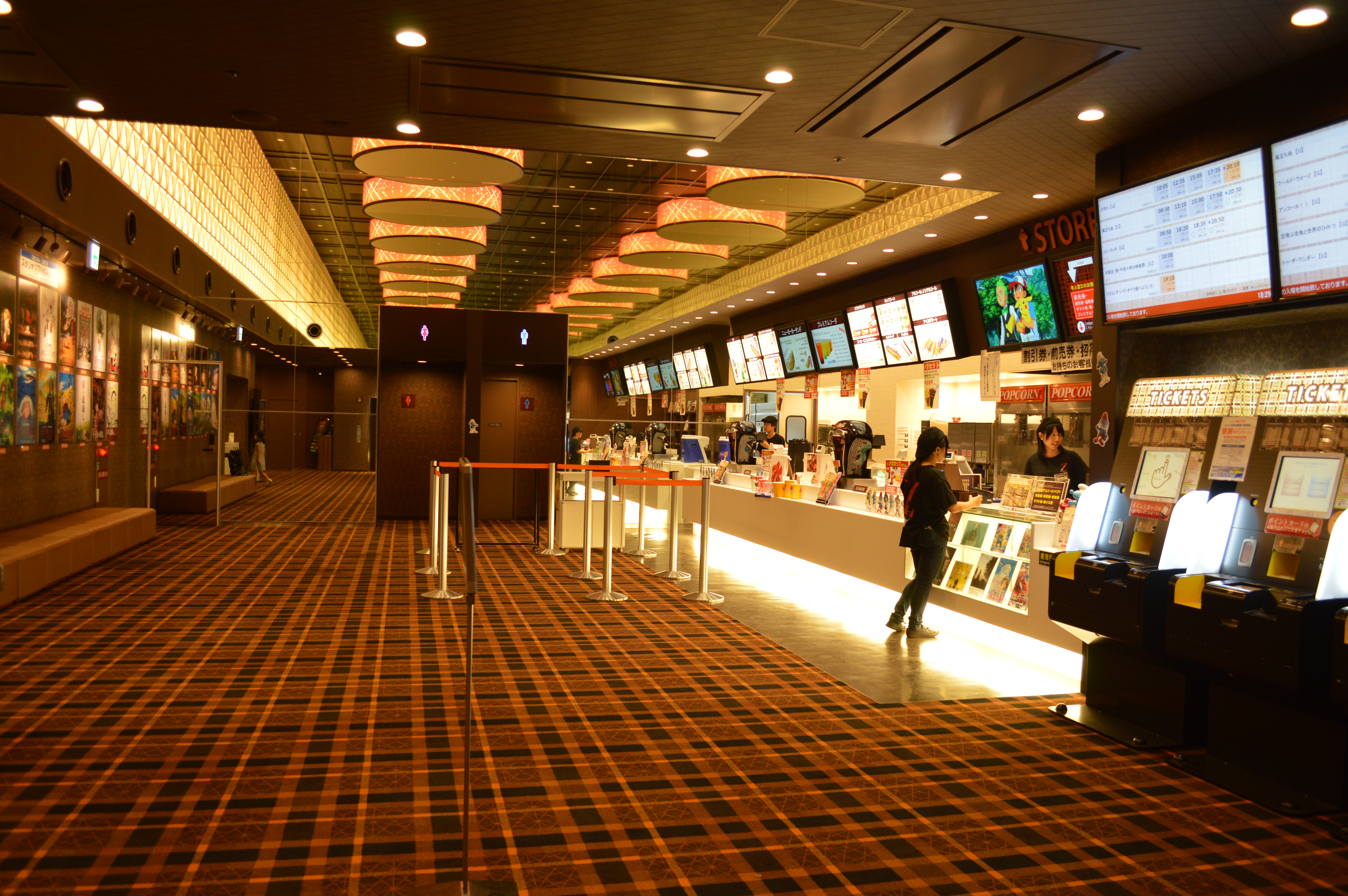 鹿児島市の映画館「天文館シネマパラダイス」のロビー